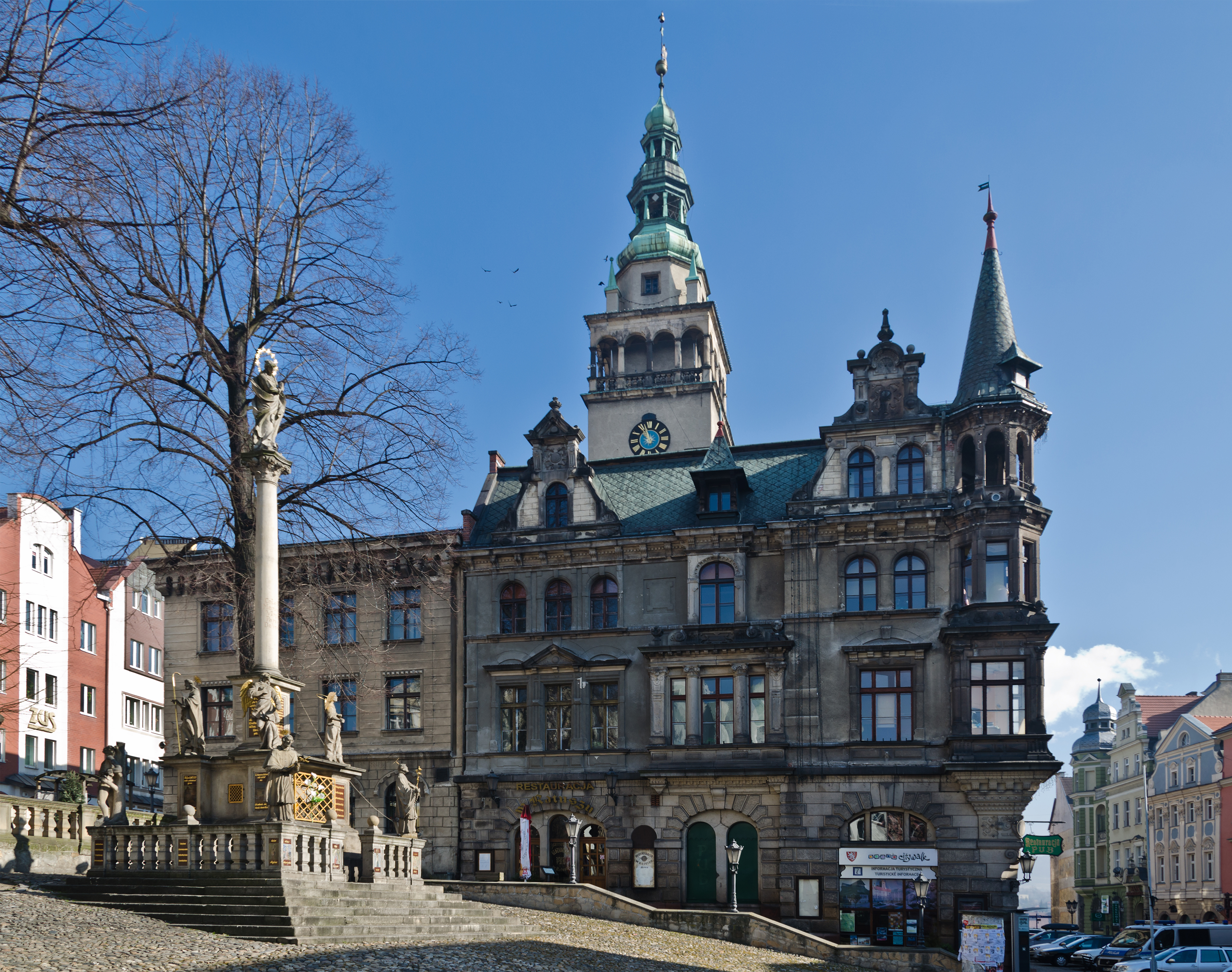 Kłodzko, ratusz, XVI, XVIII, 1890